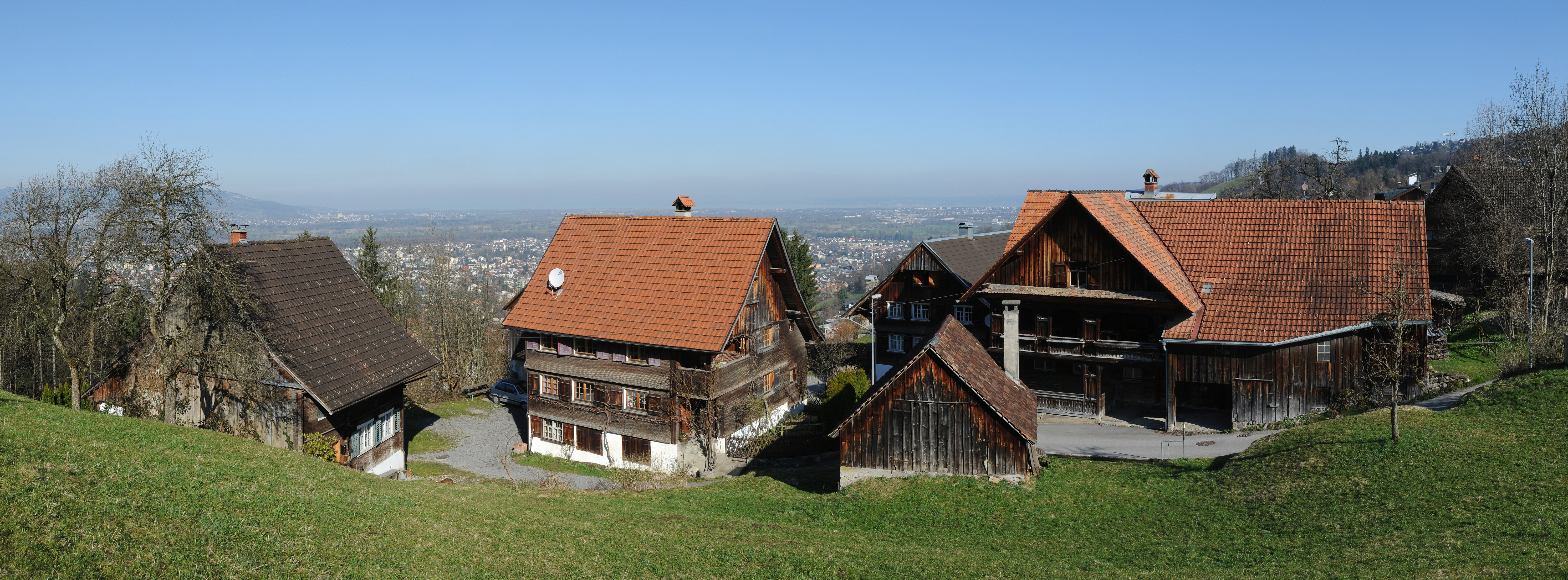 Panorama auf dem Häfenberg im Dornbirner Oberdorf. Das Quartier 1,2,3,4 sowie das Waschhaus steht unter Denkmalschutz. Im Tal die Stadt Dornbirn. NOTE: This image is a panorama consisting of multiple frames that were merged or stitched in software. As a result, this image necessarily underwent some form of digital manipulation. These manipulations may include blending, blurring, cloning, and colour and perspective adjustments. As a result of these adjustments, the image content may be slightly different from reality at the points where multiple images were combined. This manipulation is often required due to lens, perspective, and parallax distortions.